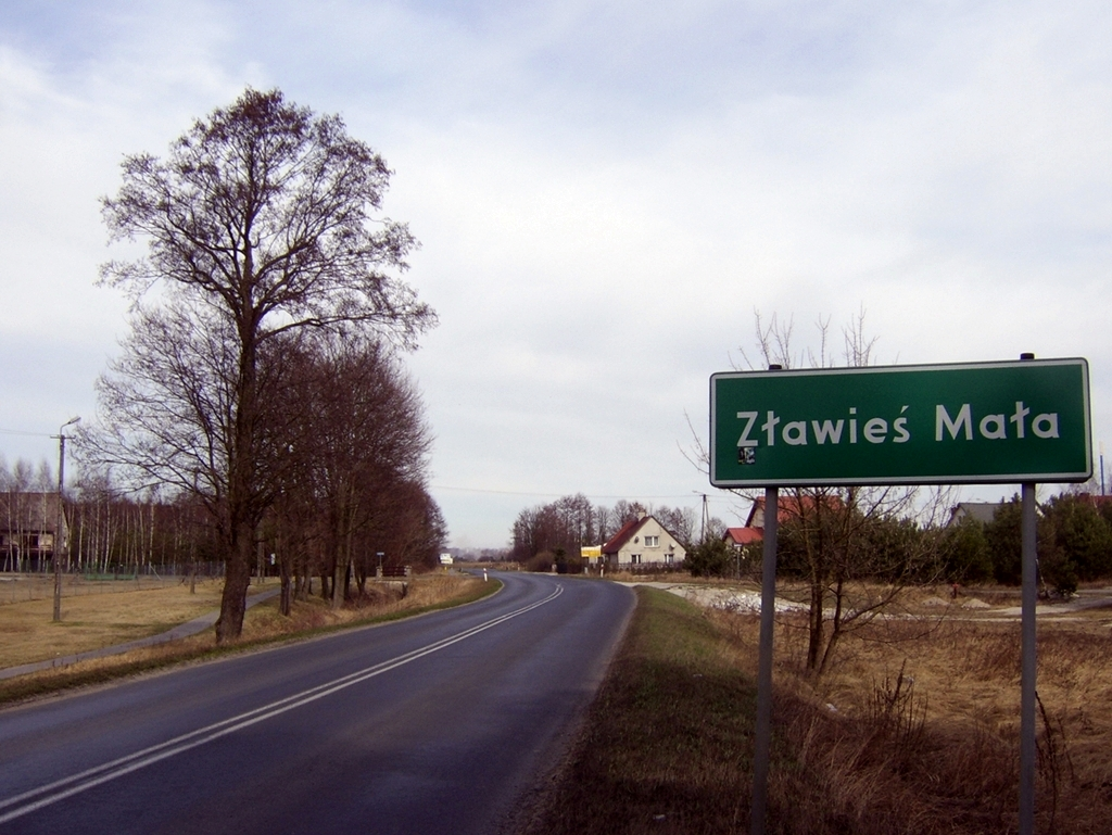 Wieś Zławieś Mała